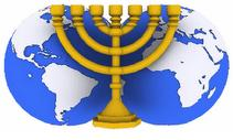 Vida Nueva para el Mundo es una organización religiosa fundamentalista cristiana evangélica